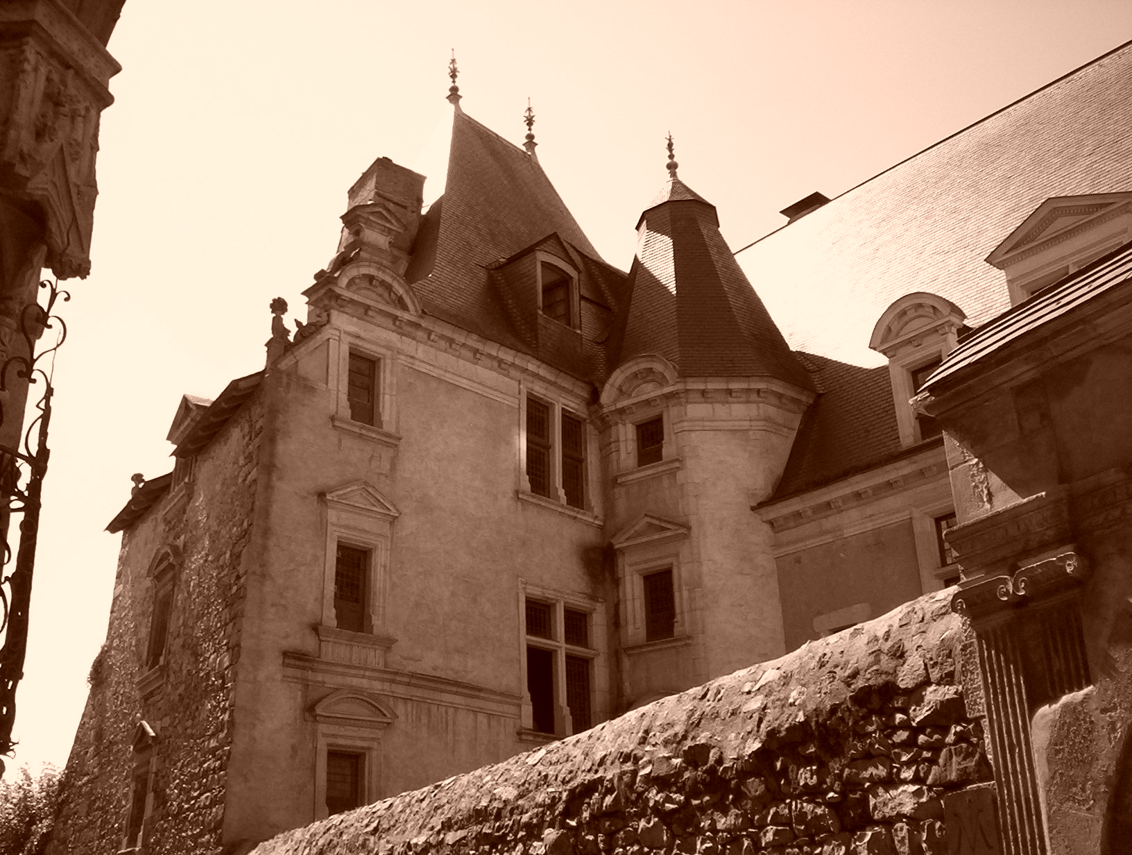 L'hôtel Denisot où naquit le fameux poète de la Pléiade, au Mans.